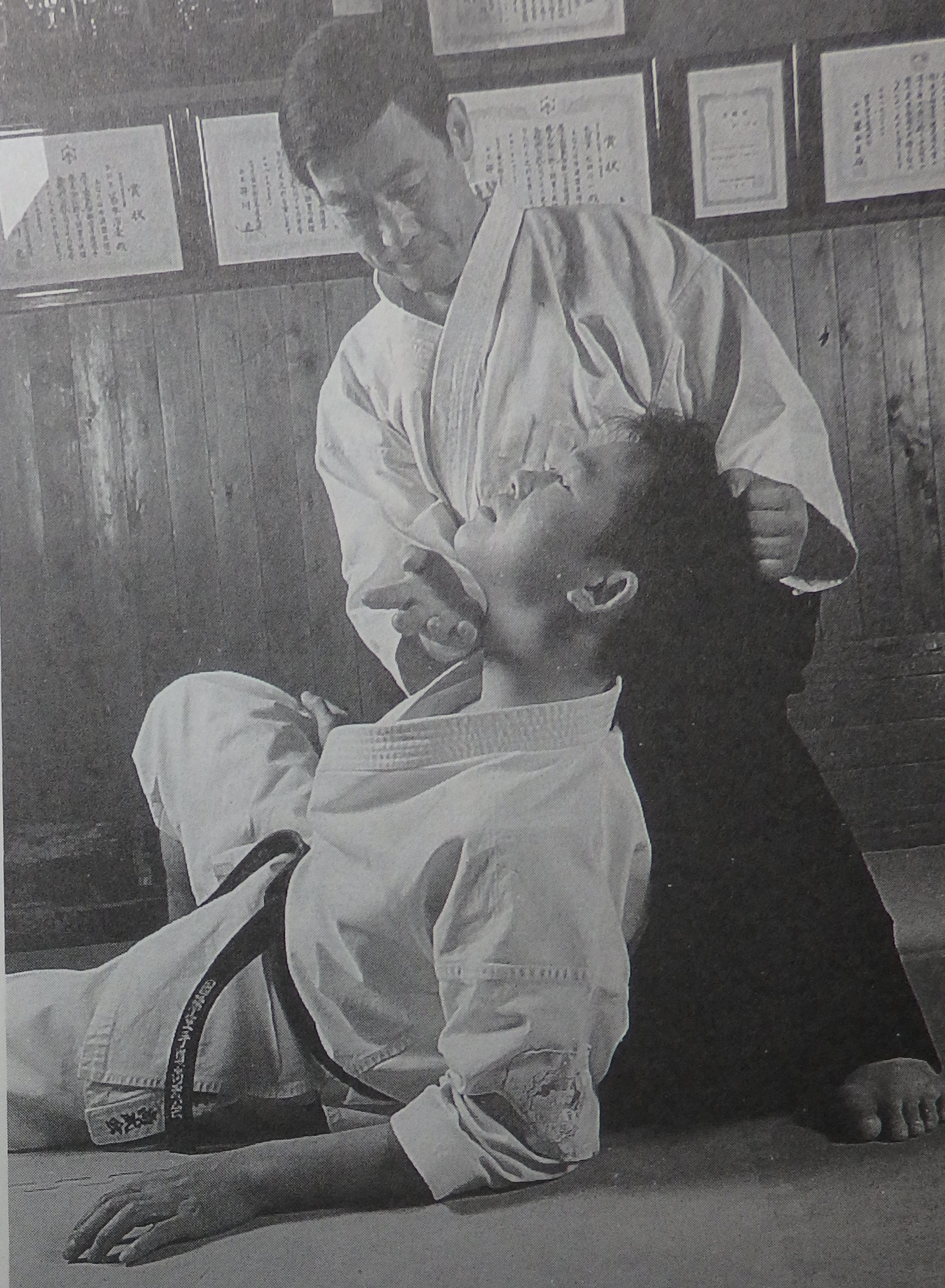 藤本師範 制剛流 大小詰